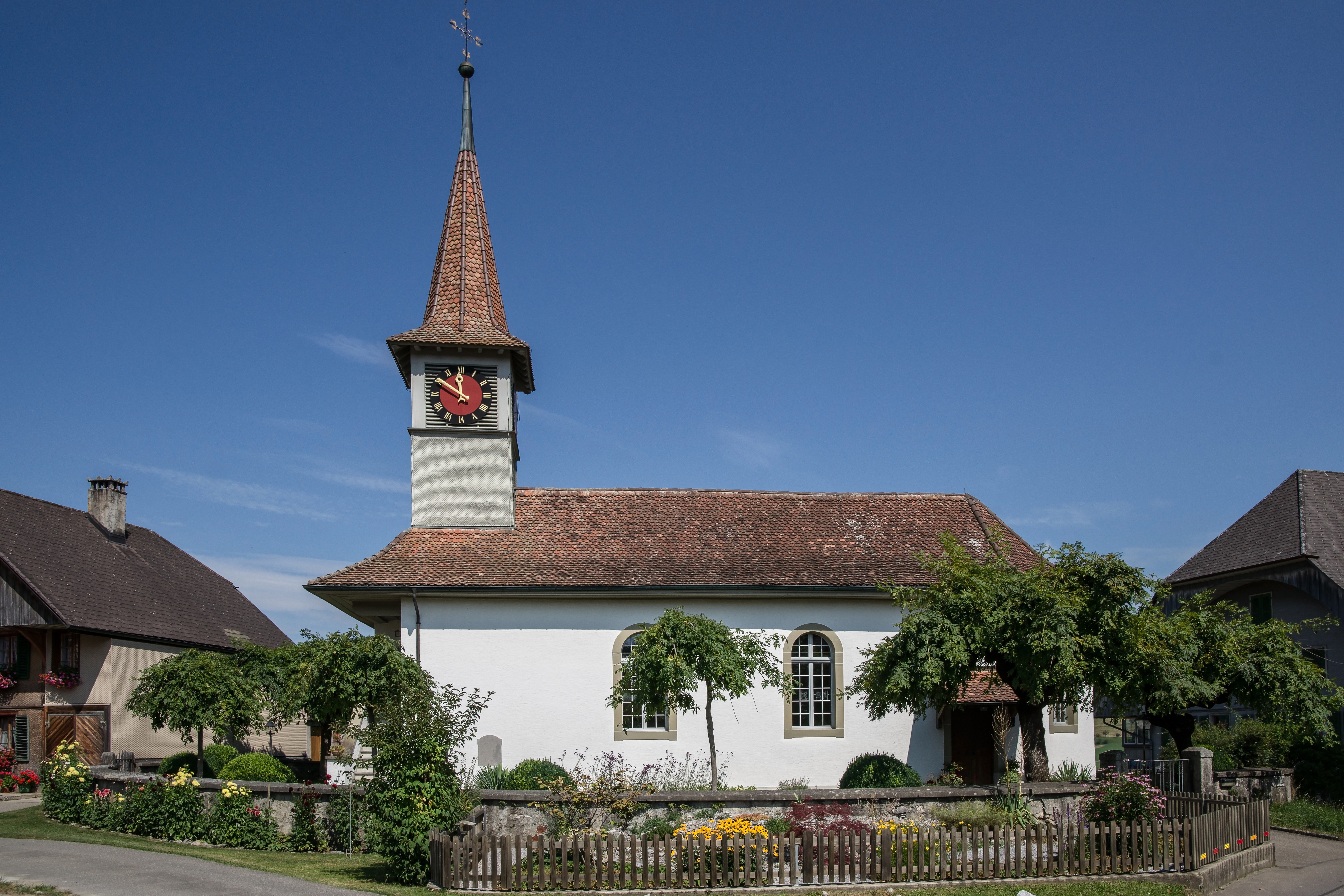 Reformierte Kirche Schlosswil